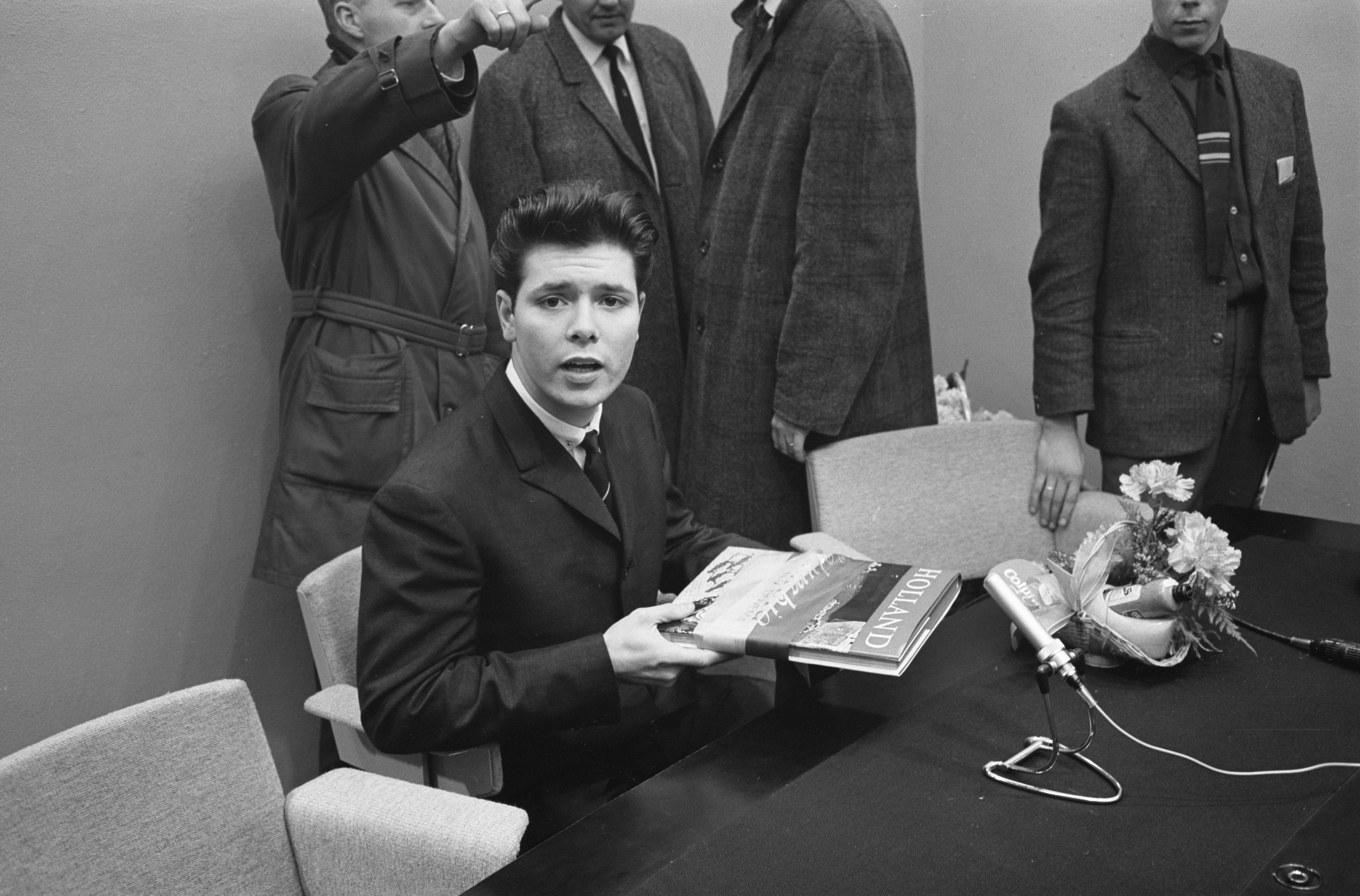 Collectie / Archief : Fotocollectie Anefo Reportage / Serie : [ onbekend ] Beschrijving : Cliff Richard aankomst met zijn Shadows Datum : 6 april 1962 Locatie : Noord-Holland, Schiphol Trefwoorden : artiesten, muziek Persoonsnaam : Richard, Cliff Instellingsnaam : Shadows, The Fotograaf : Pot, Harry / Anefo Auteursrechthebbende : Nationaal Archief Materiaalsoort : Negatief (zwart/wit) Nummer archiefinventaris : bekijk toegang 2.24.01.05 Bestanddeelnummer : 913-7396